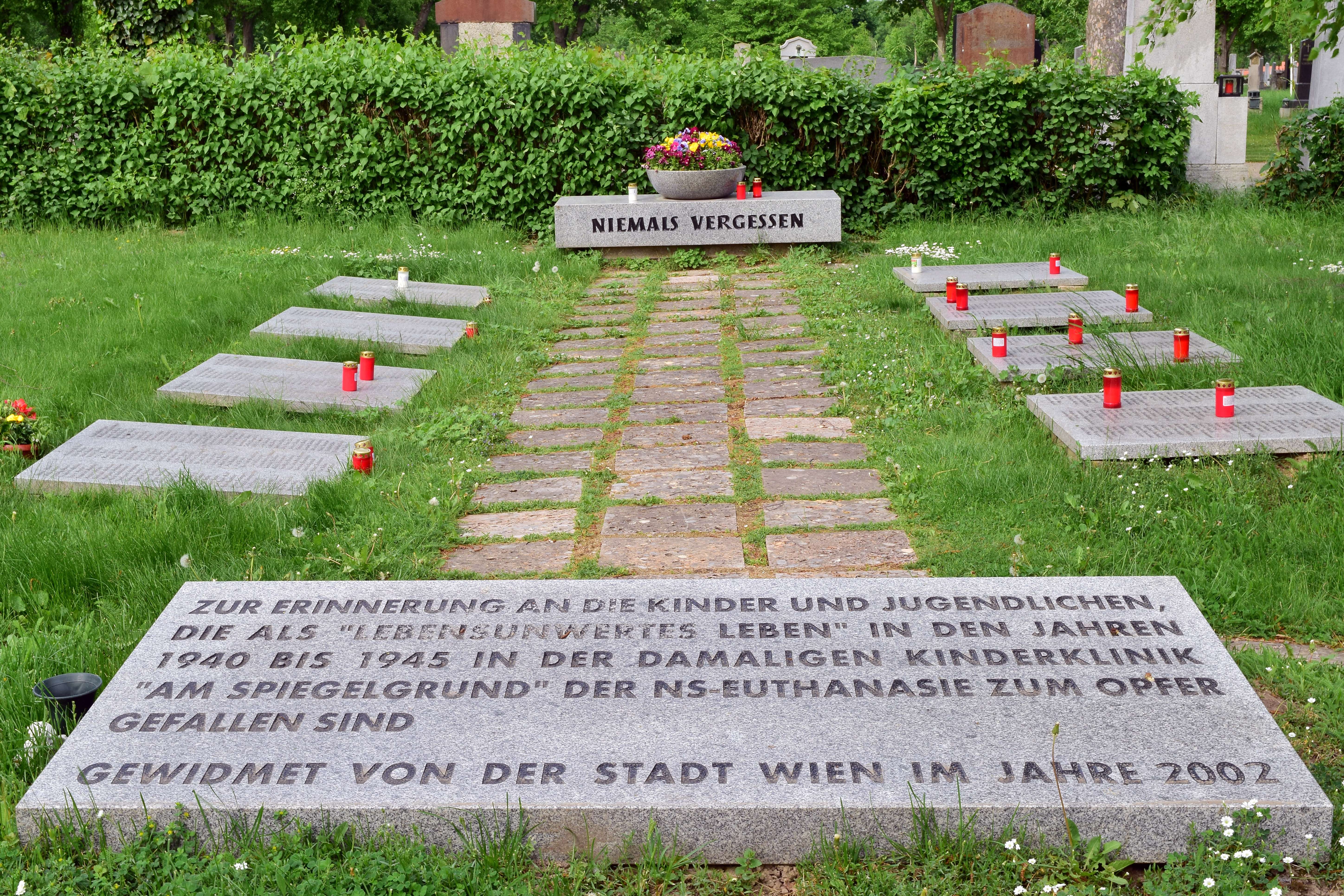 Hier wurden die sterblichen Überreste von 789 Kindern begraben, die in der Zeit des Nationalsozialismus in der Kinderfachabteilung der Krankenanstalt Am Spiegelgrund den Tod fanden und vor und nach ihrem Tod u.a. von Heinrich Gross für medizinische Forschungen missbraucht wurden.